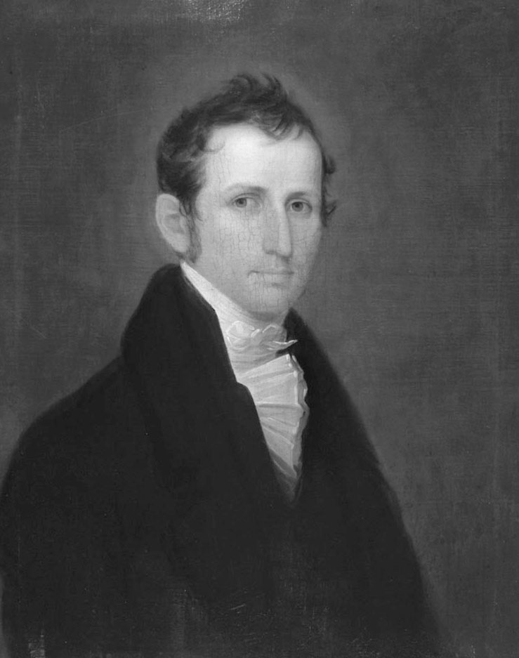 Andrew Stuart